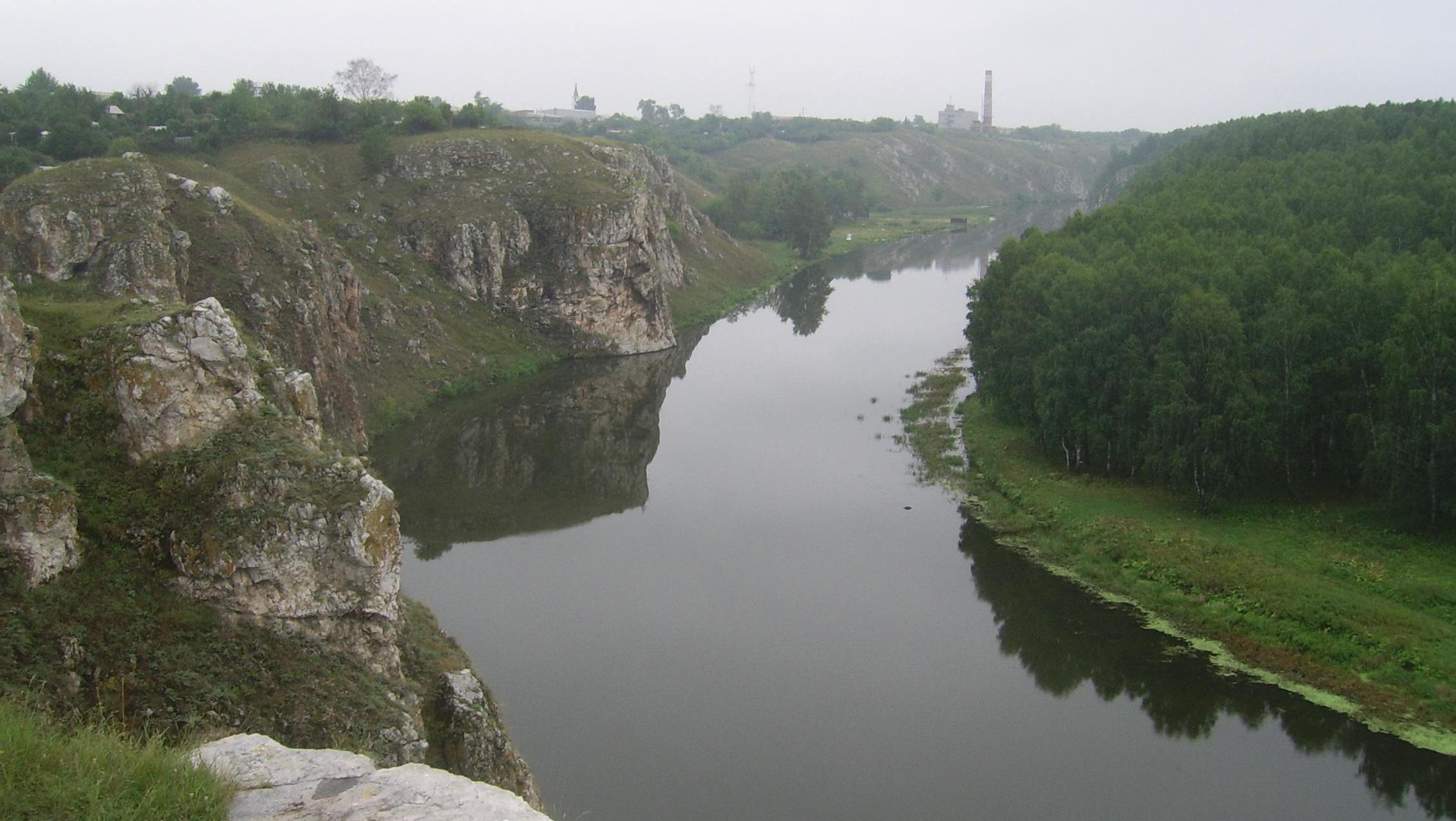 Gezicht over de Iset vanaf de rots 'Drie Grotten' (tri pesjtsjery) nabij Kamensk-Oeralski